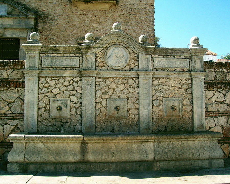 Fuente de la Plaza Alta Aracena